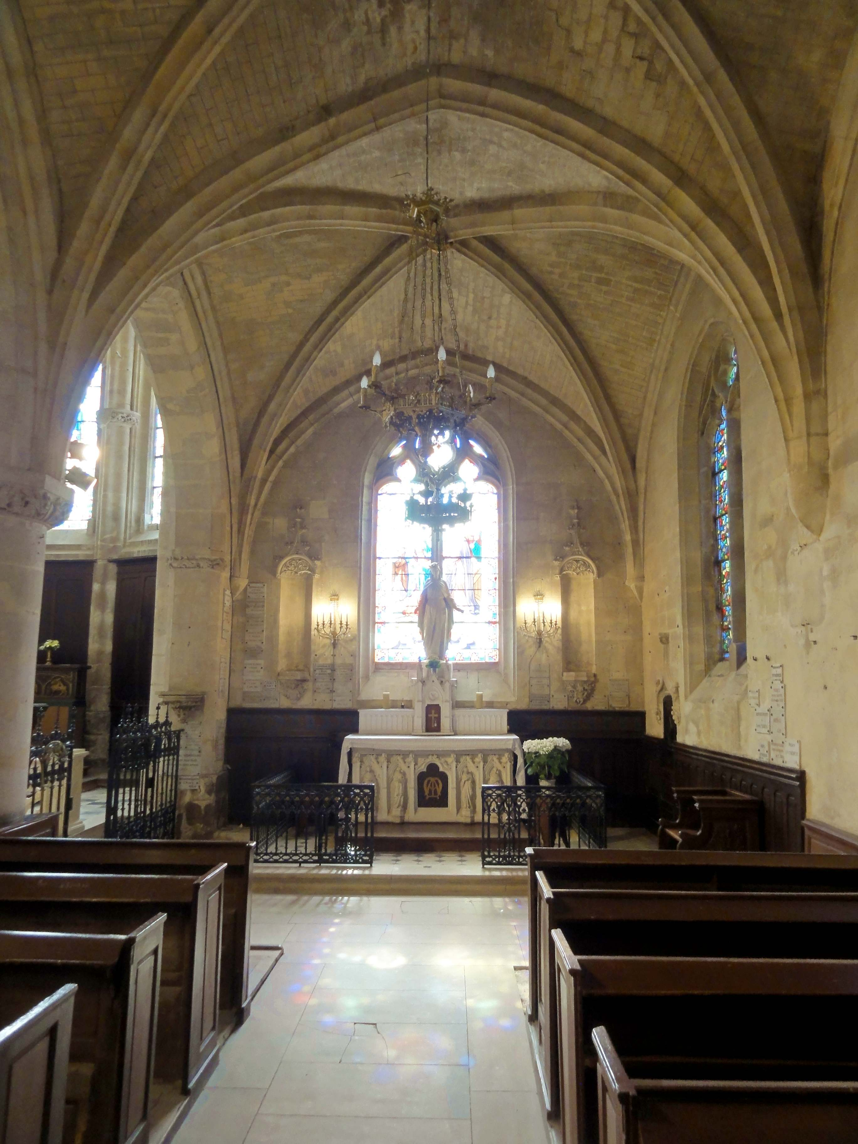 Collatéral sud du chœur, vue vers l'est.